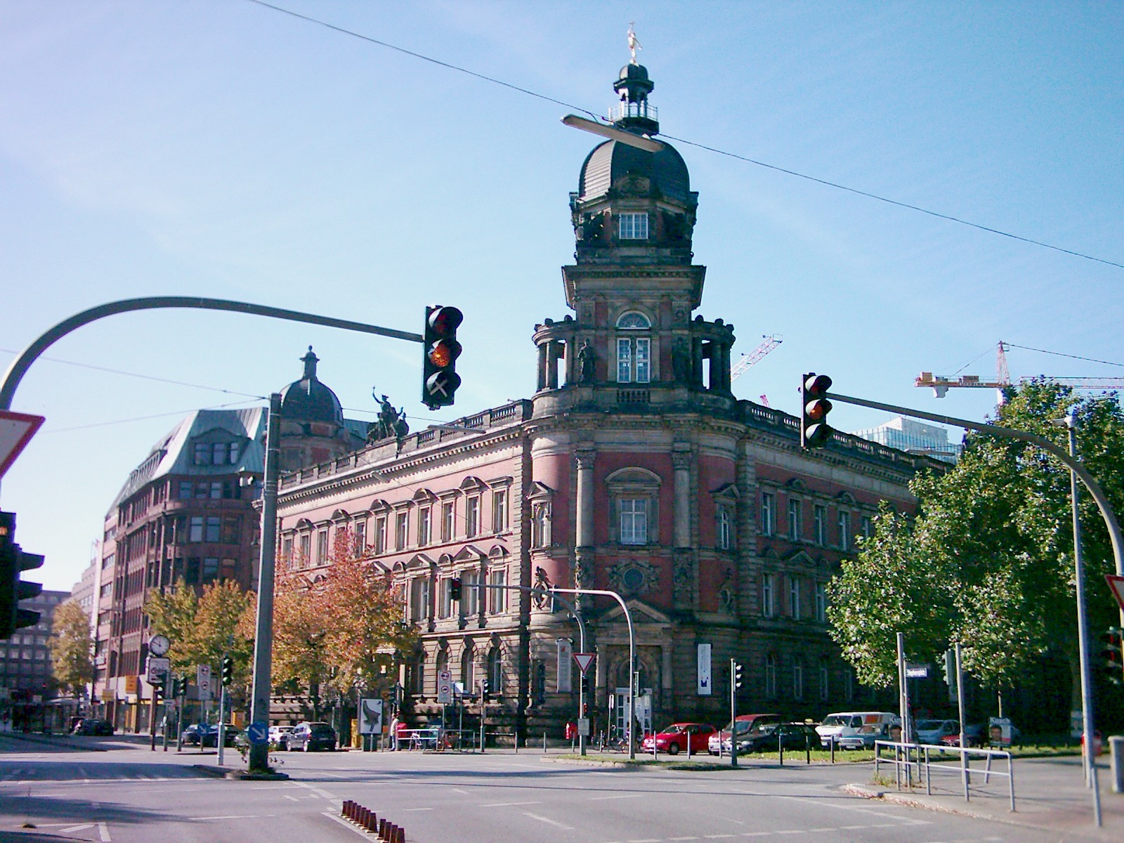 Die 1883 bis 1887 erbaute ehemalige Oberpostdirektion am Stephansplatz, Dammtorstraße Ecke Gorch-Fock-Wall, Hamburg.